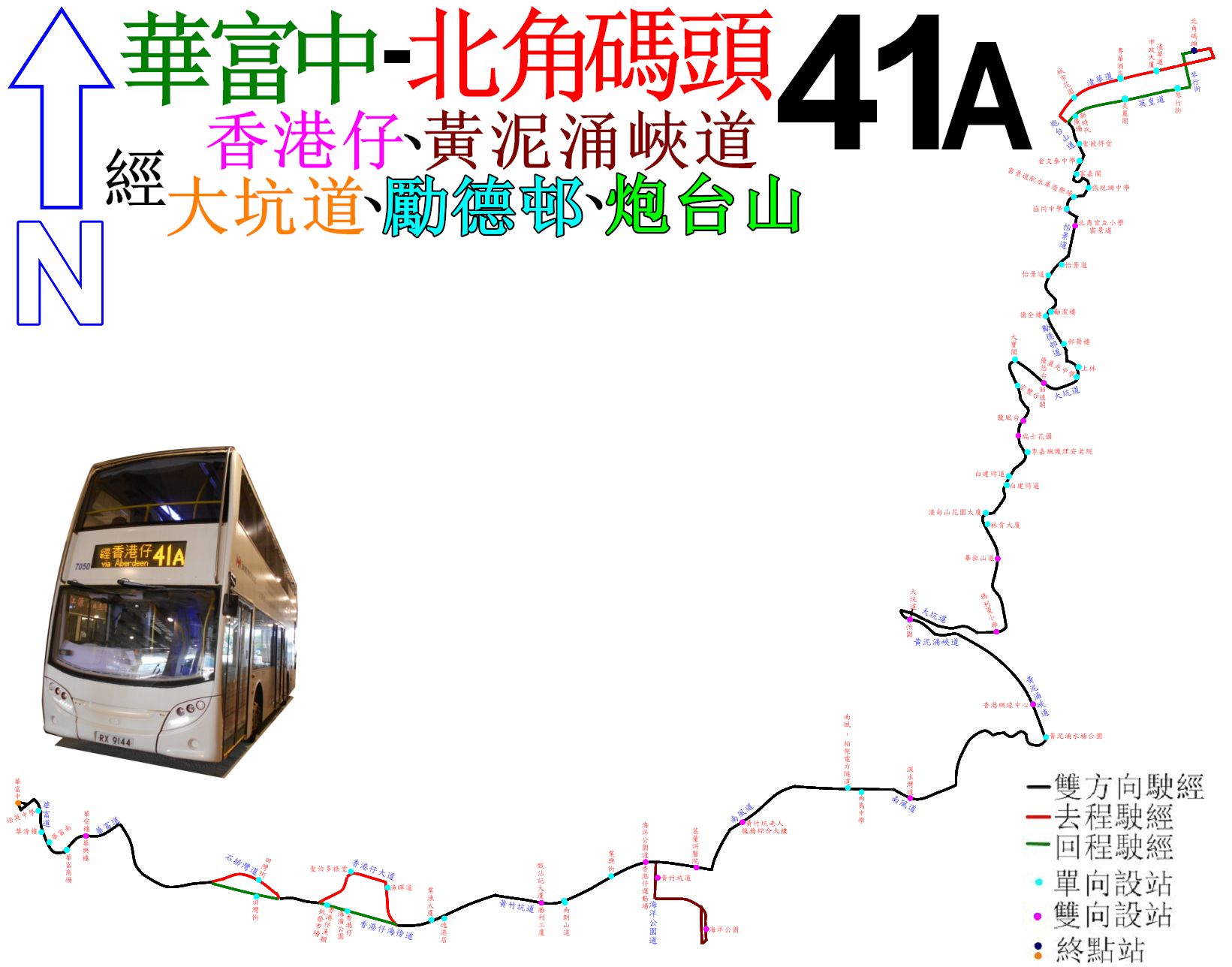 中文（香港）: 城巴41A走線圖